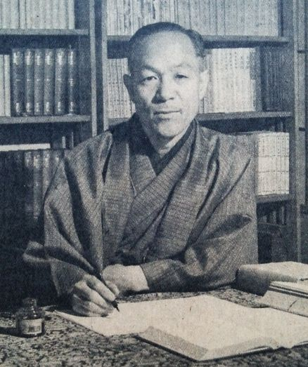 横田喜三郎